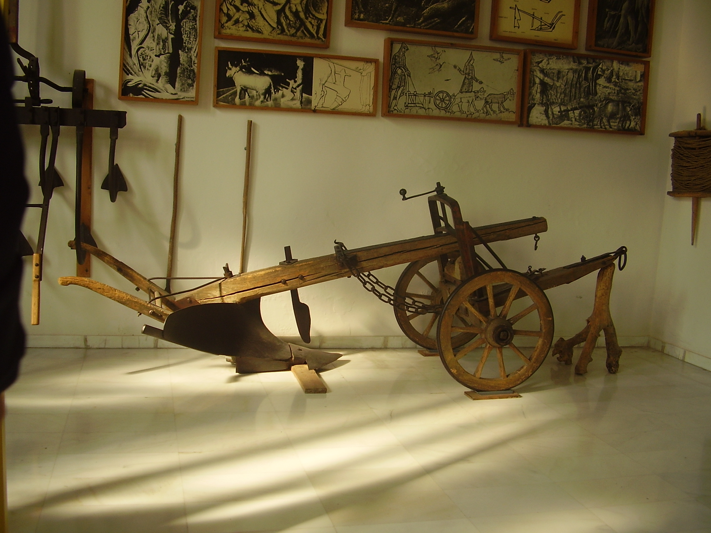 Antico aratro romagnolo